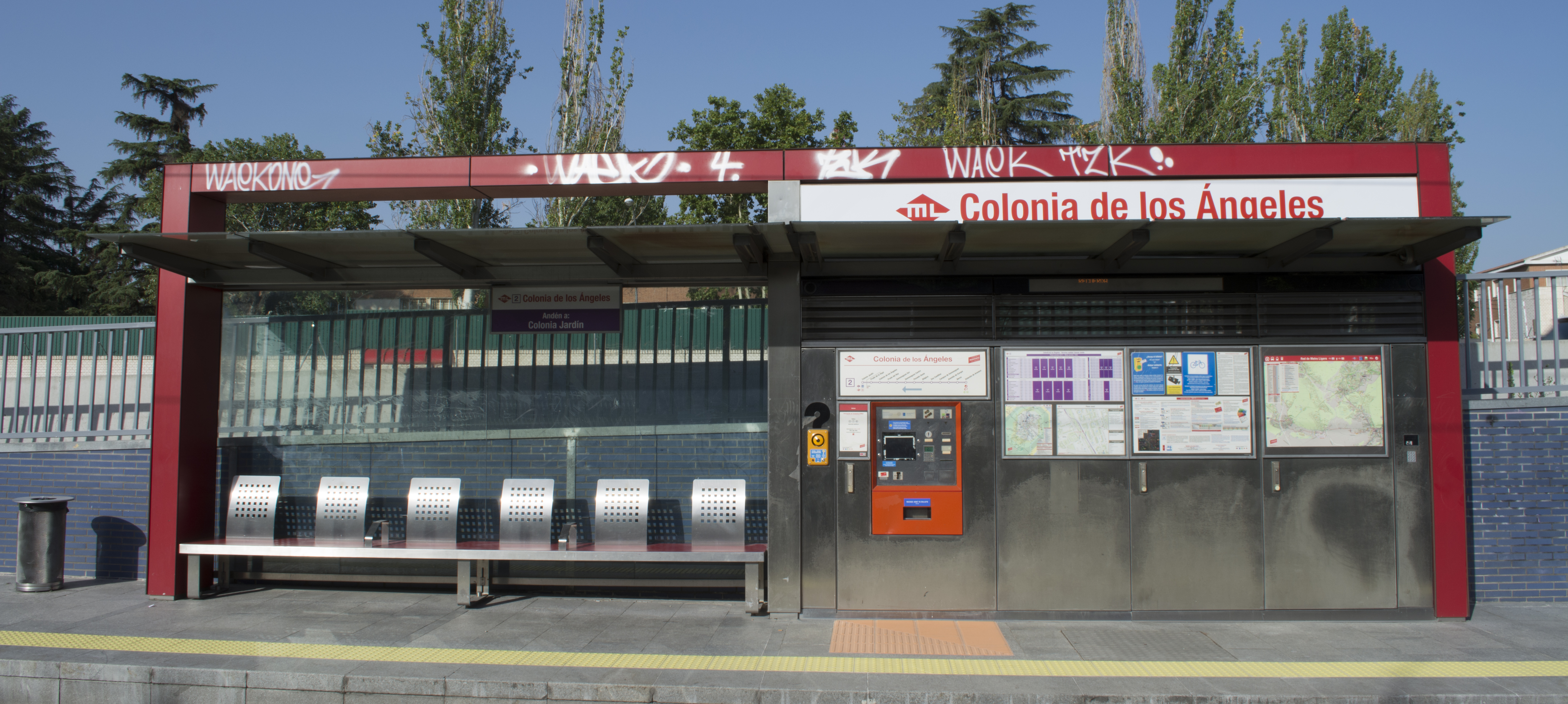 Andén de la estación Colonia de los Ángeles, de Metro Ligero Madrid, en dirección Colonia Jardín.